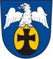 Kvasiny znak